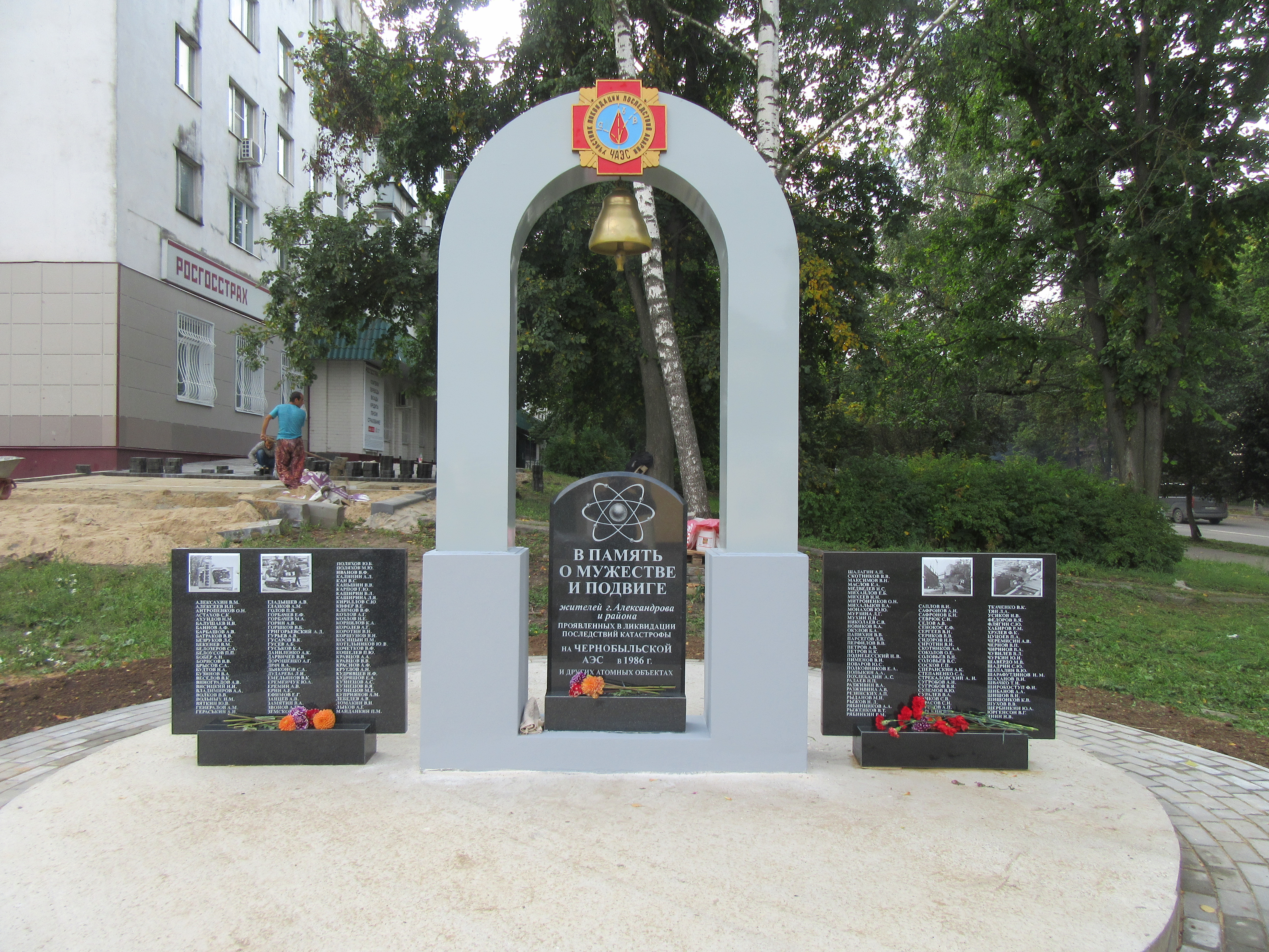 Monuments aux liquidateurs victimes de la catastrophe de Tchernobyl